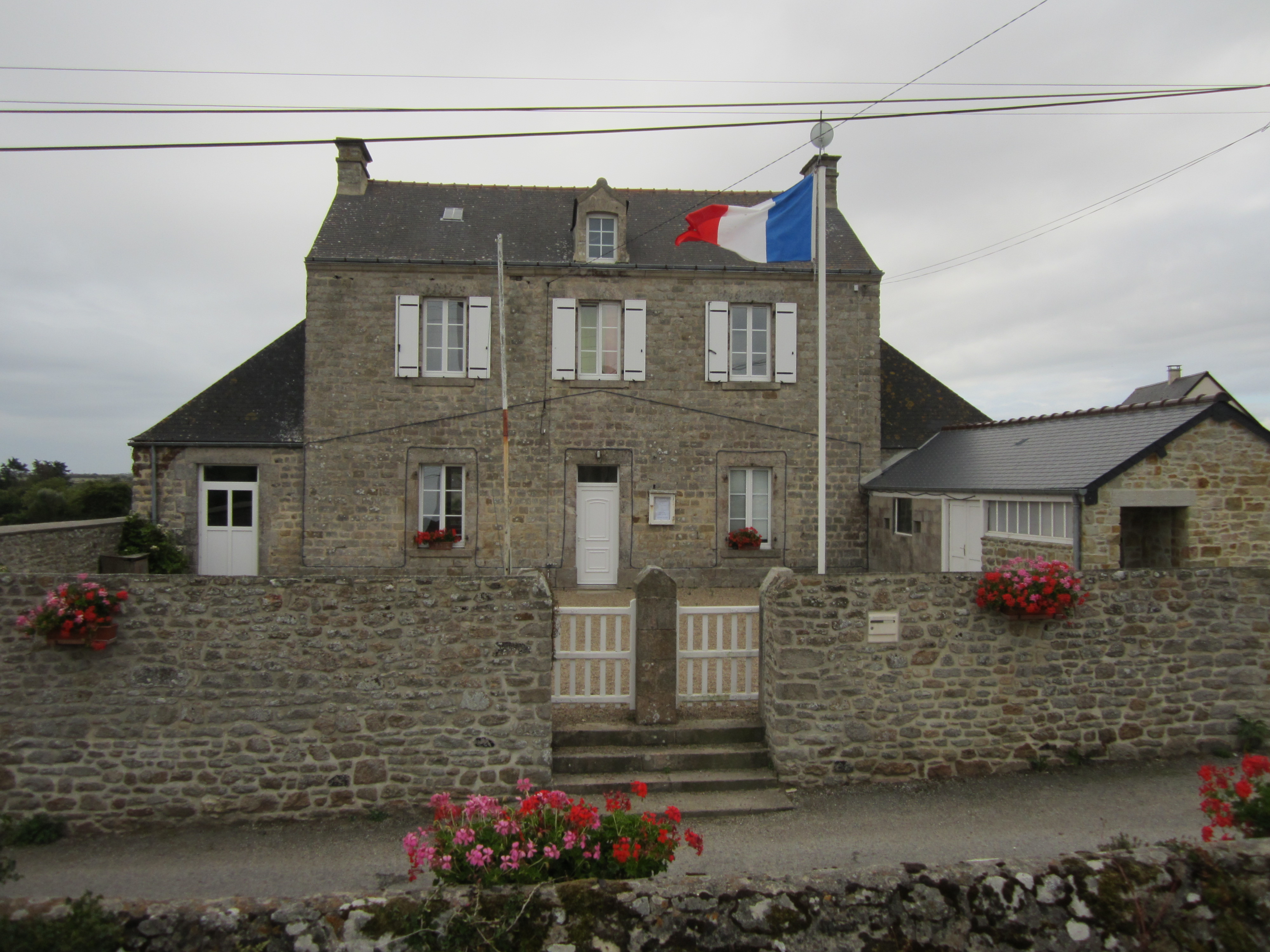 Néville-sur-Mer